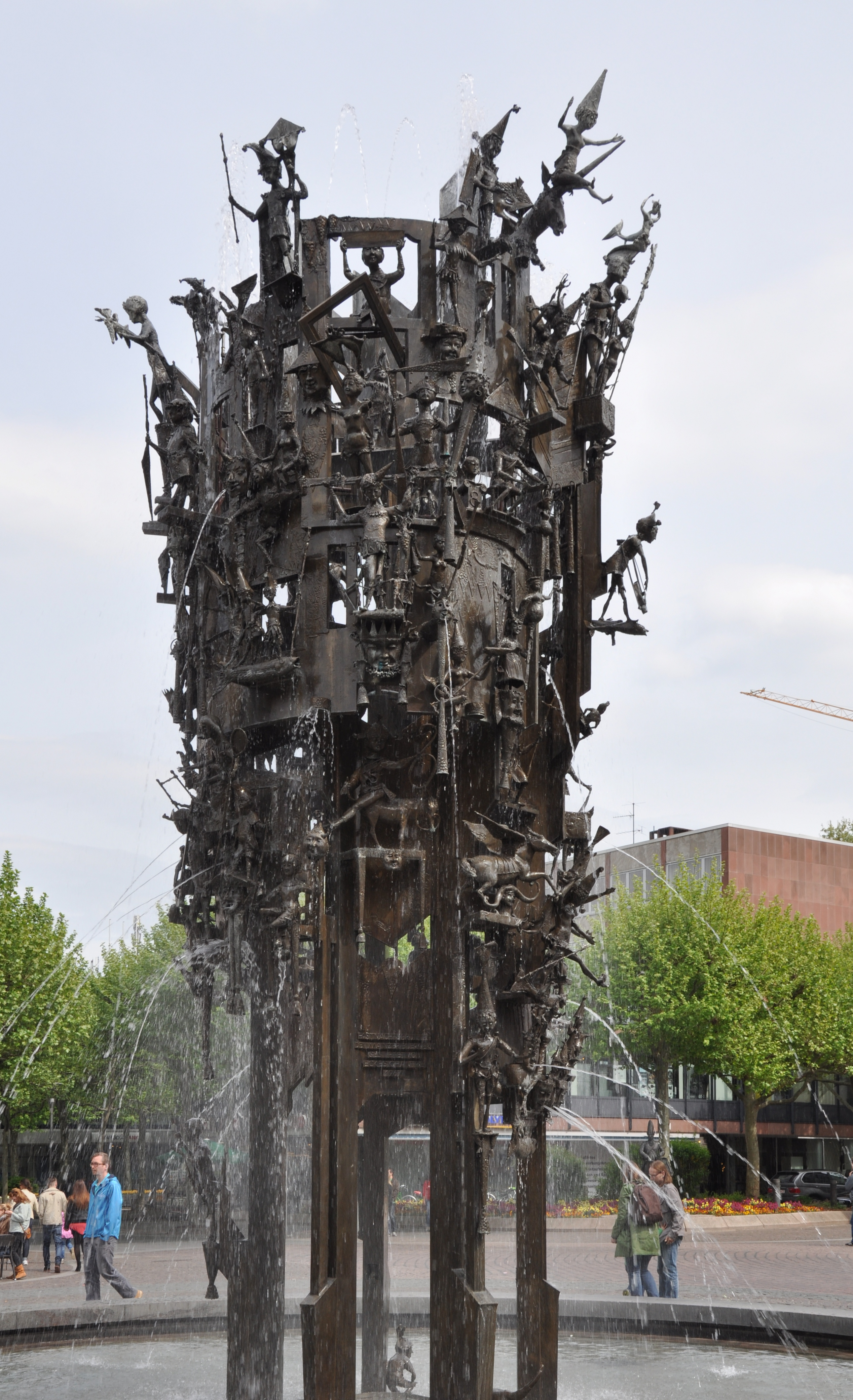 Mainz, Fastnachtsbrunnen auf dem Schillerplatz, Bildhauer: Blasius Spreng, 1967